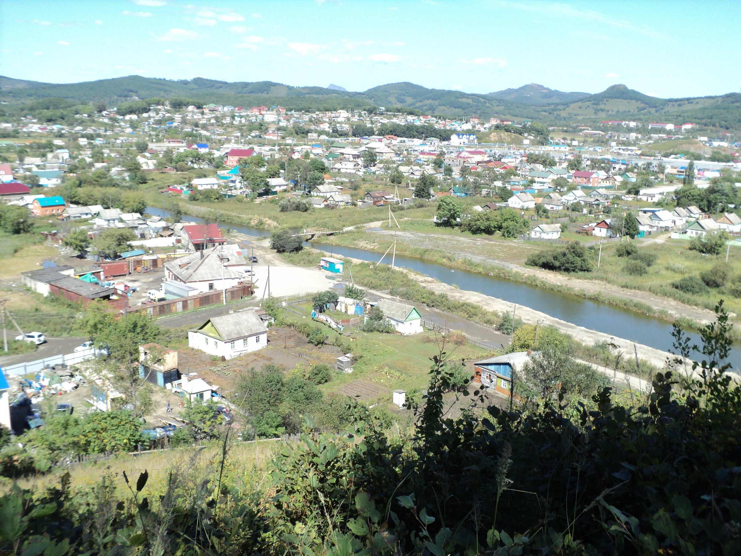 Место размещения деревни Американки